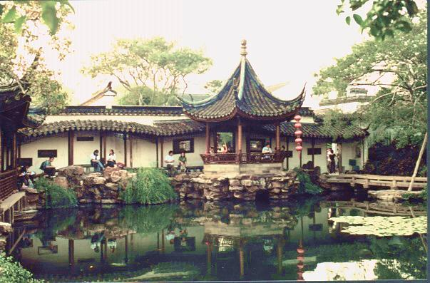 网师园 Master of Nets Garden — in Suzhou.